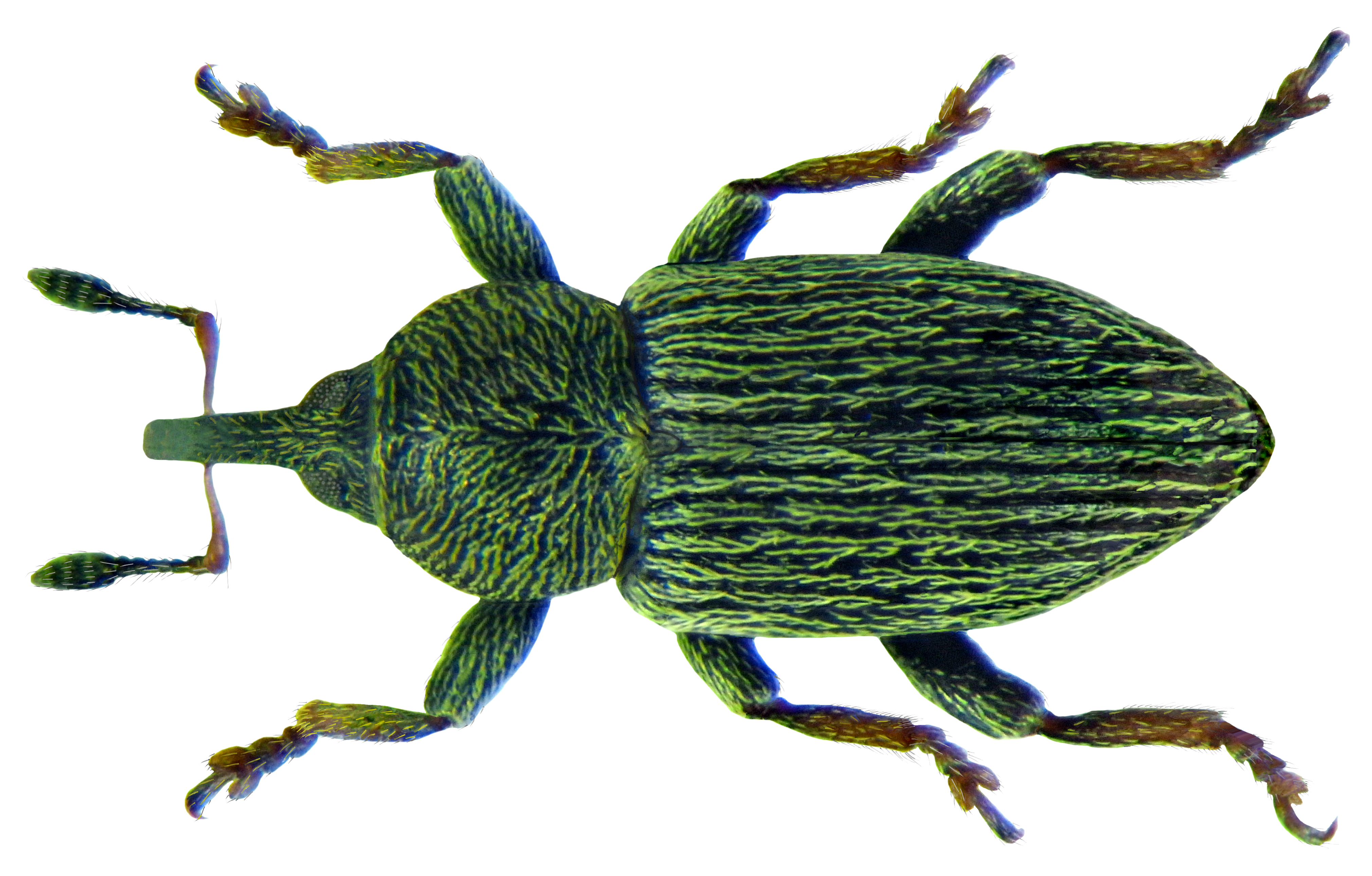 Familie: Curculionidae Groesse: 2,2 mm (2-2,3 mm) Verbreitung: Europa Oekologie; Entwicklung in den Bluetenkoepfen von Trifolium-Arten Fundort: Germania, Bayern, Oberfranken, Selbitz leg.det. U.Schmidt, 3.VI.2005 Photo: U.Schmidt, 2013